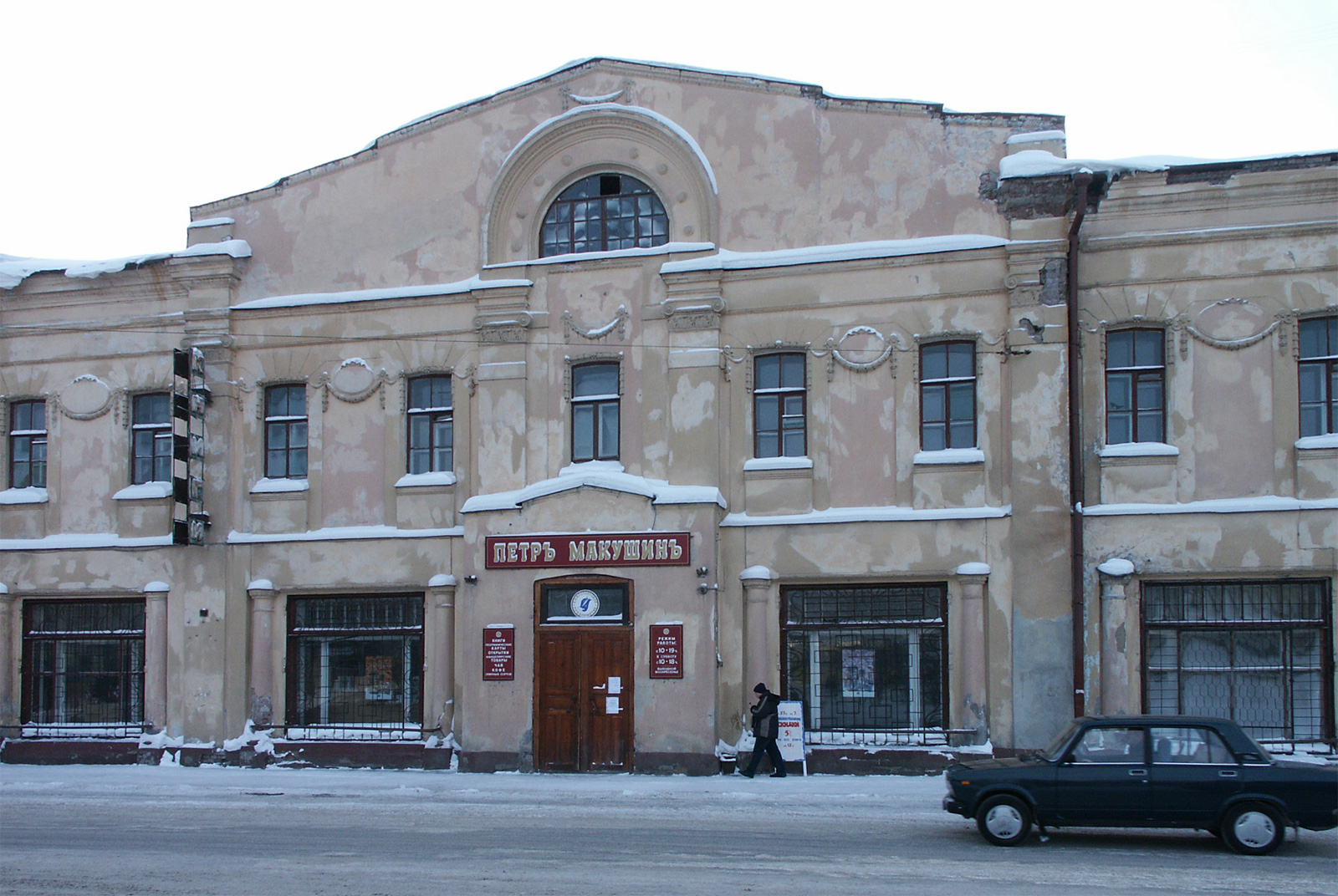 переулок Батенькова, д. 5